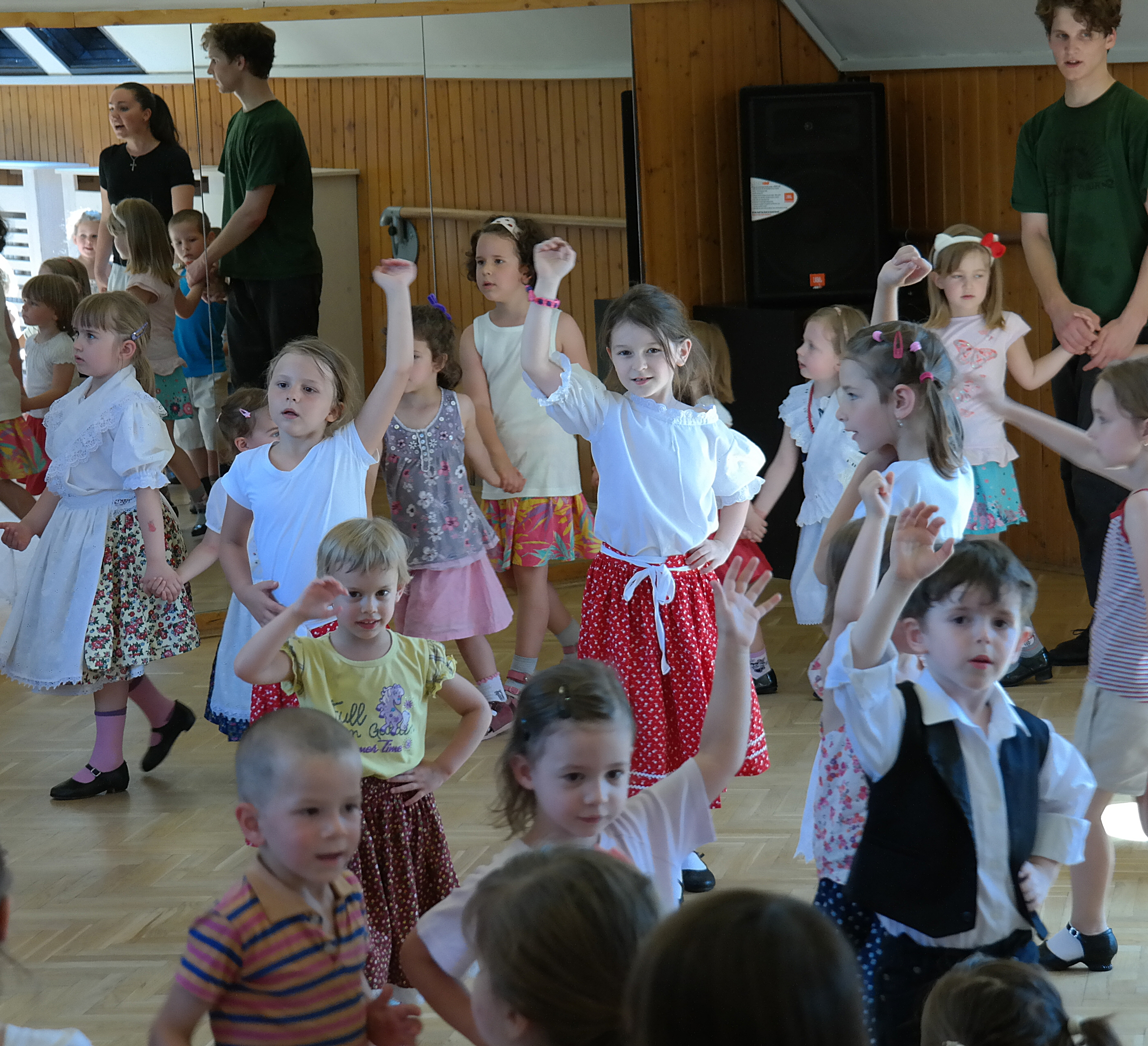 Csillagszeműek. Főpróba a 2013. június 20.-i jubileumi előadás előtt. Virányosi Közösségi Ház.